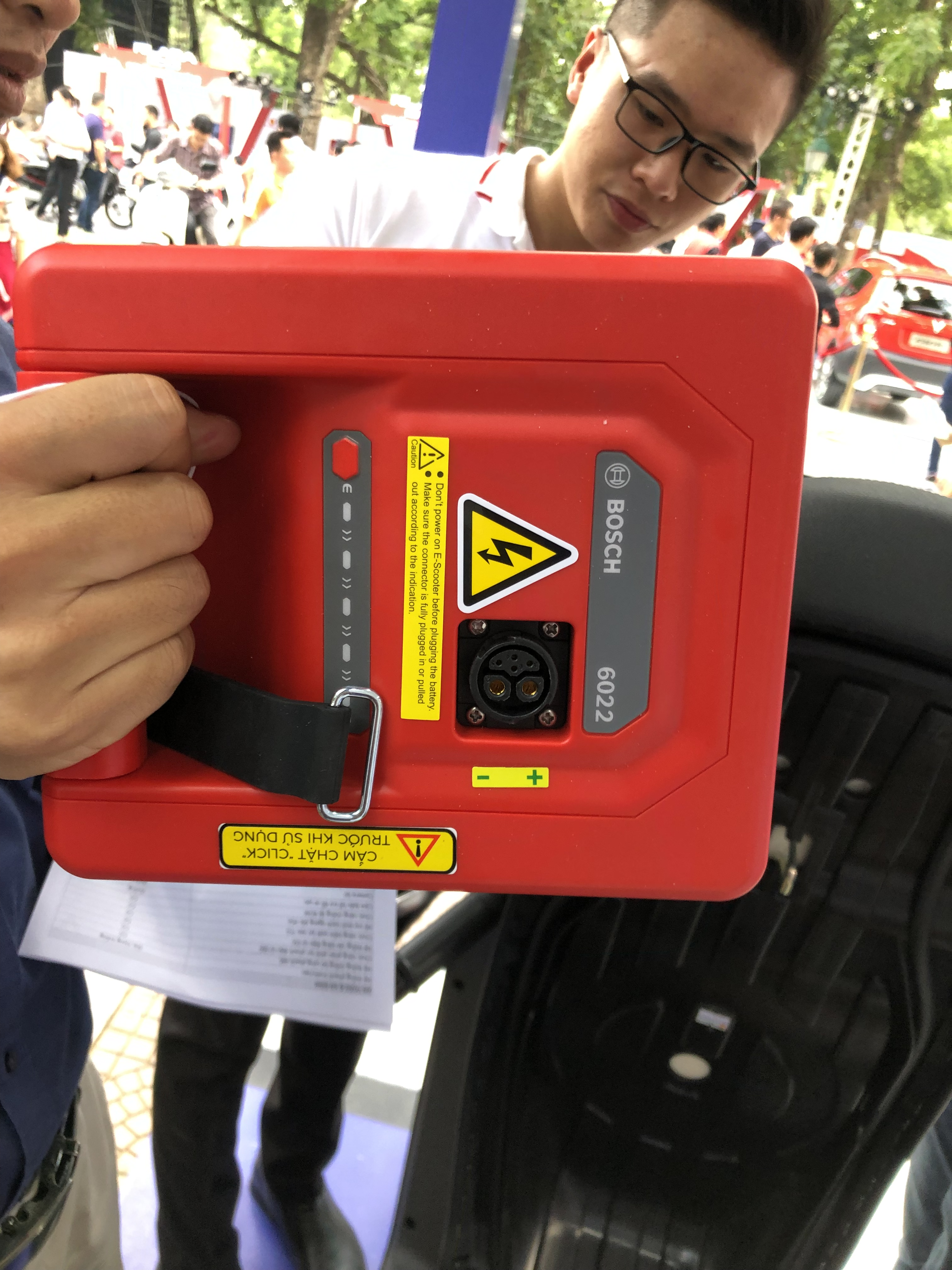 Pin 17INR19/65-8, 61.2V 22.0Ah model RBLi6022035CA-OS2 của Bosch sử dụng cho xe máy điện Klara của VinFast